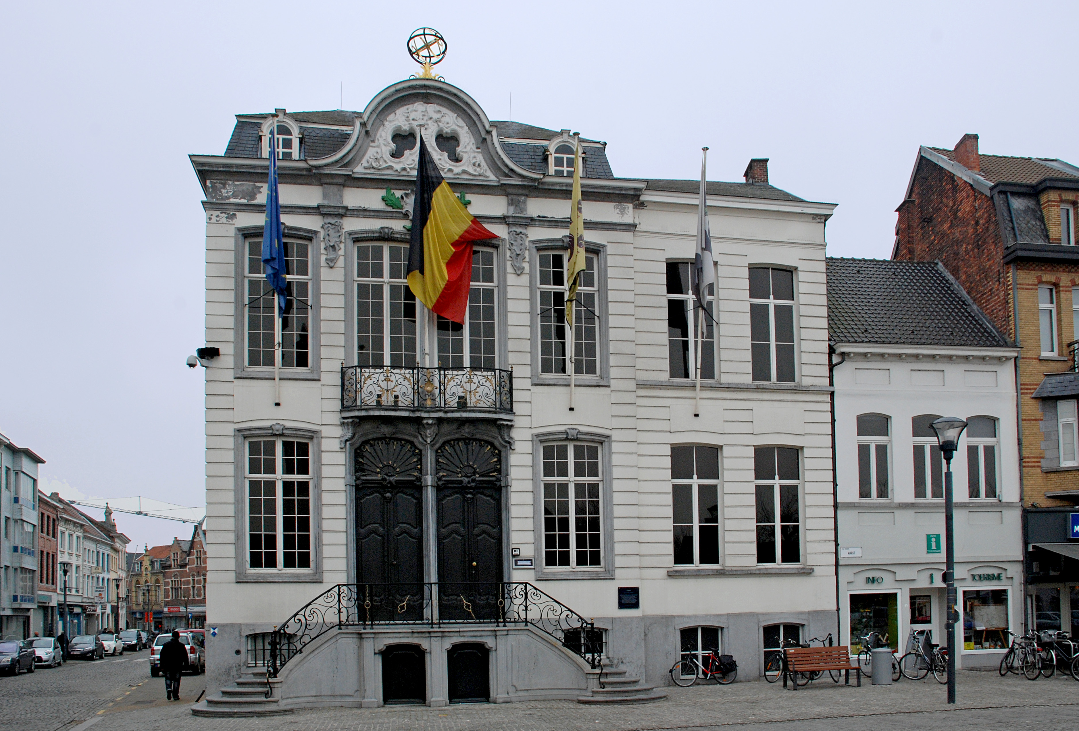 Lokeren (België). Stadhuis (onroerend erfgoed ID 17915).